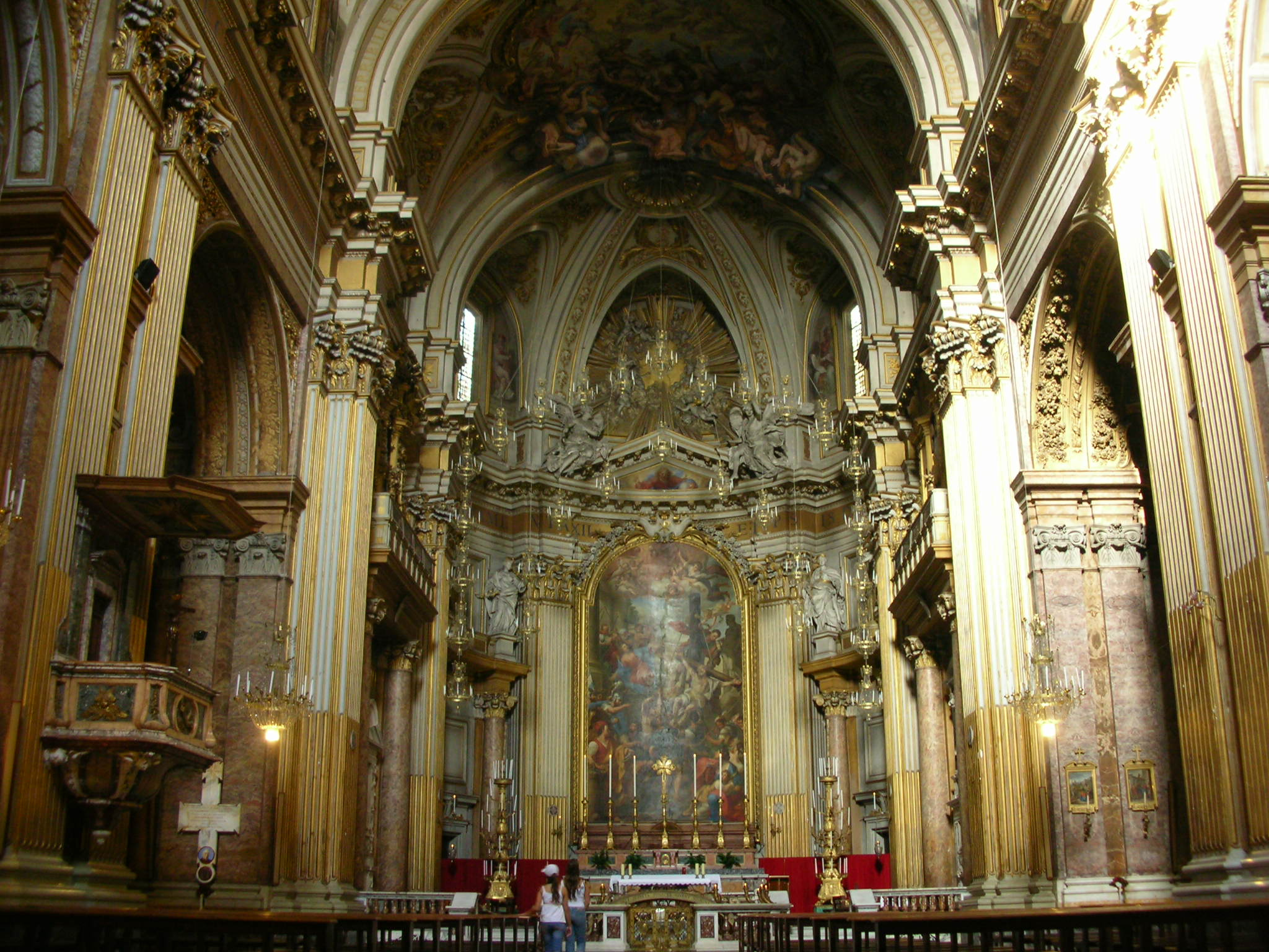 Interior, Santi Apostoli, Rome